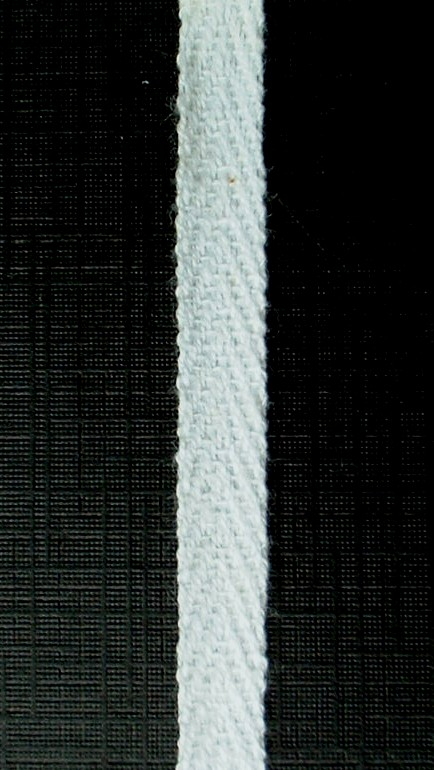 Bauwolltresse 6 mm breit